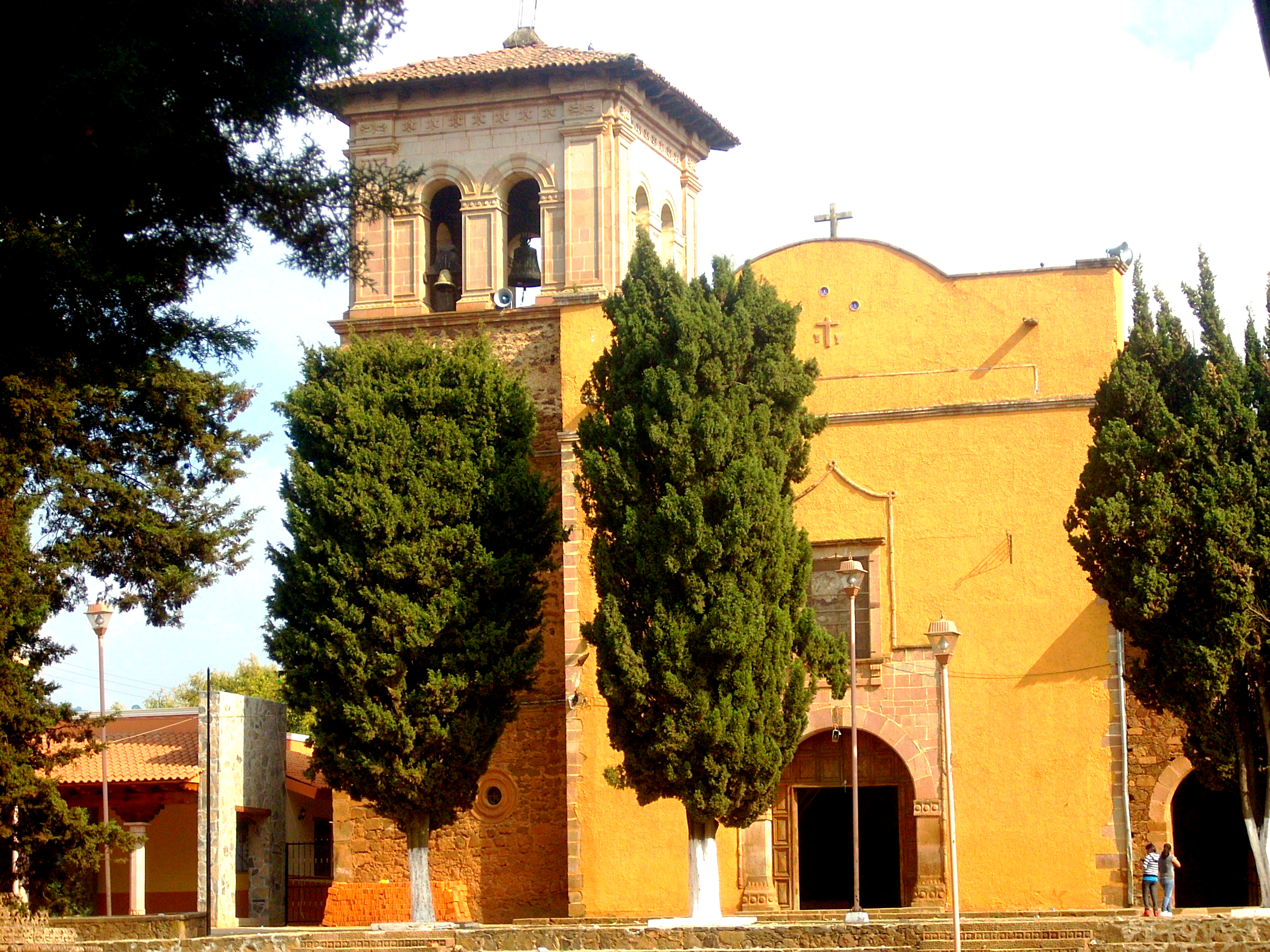 Pueblo de Tarecuato Mich